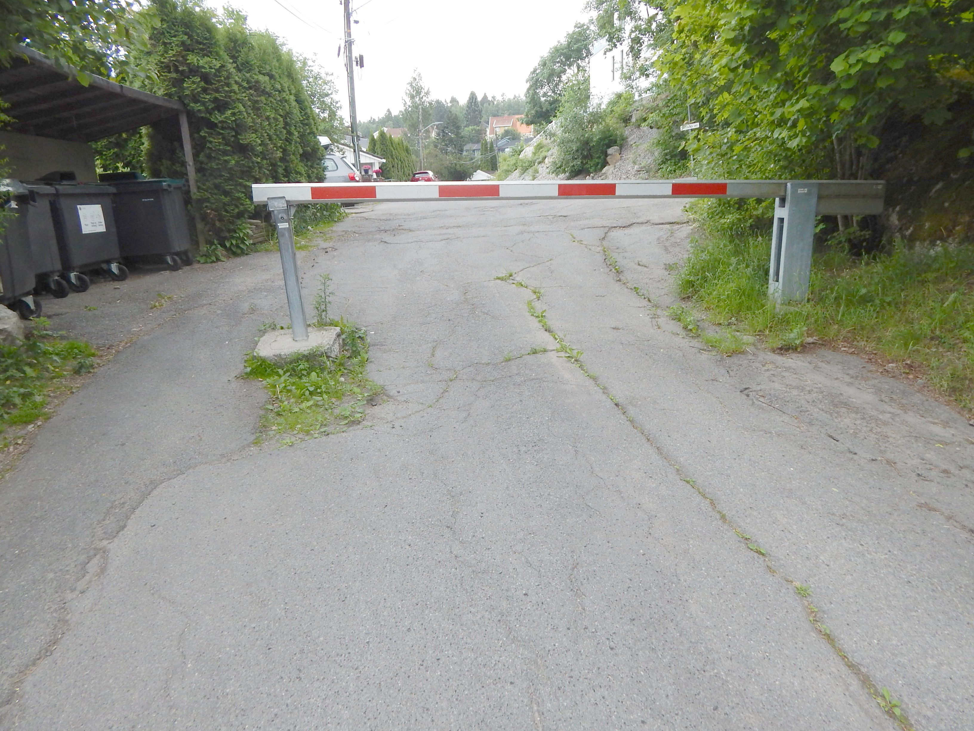 Rognerudveien er stengt med bom like over Harry Fetts vei.